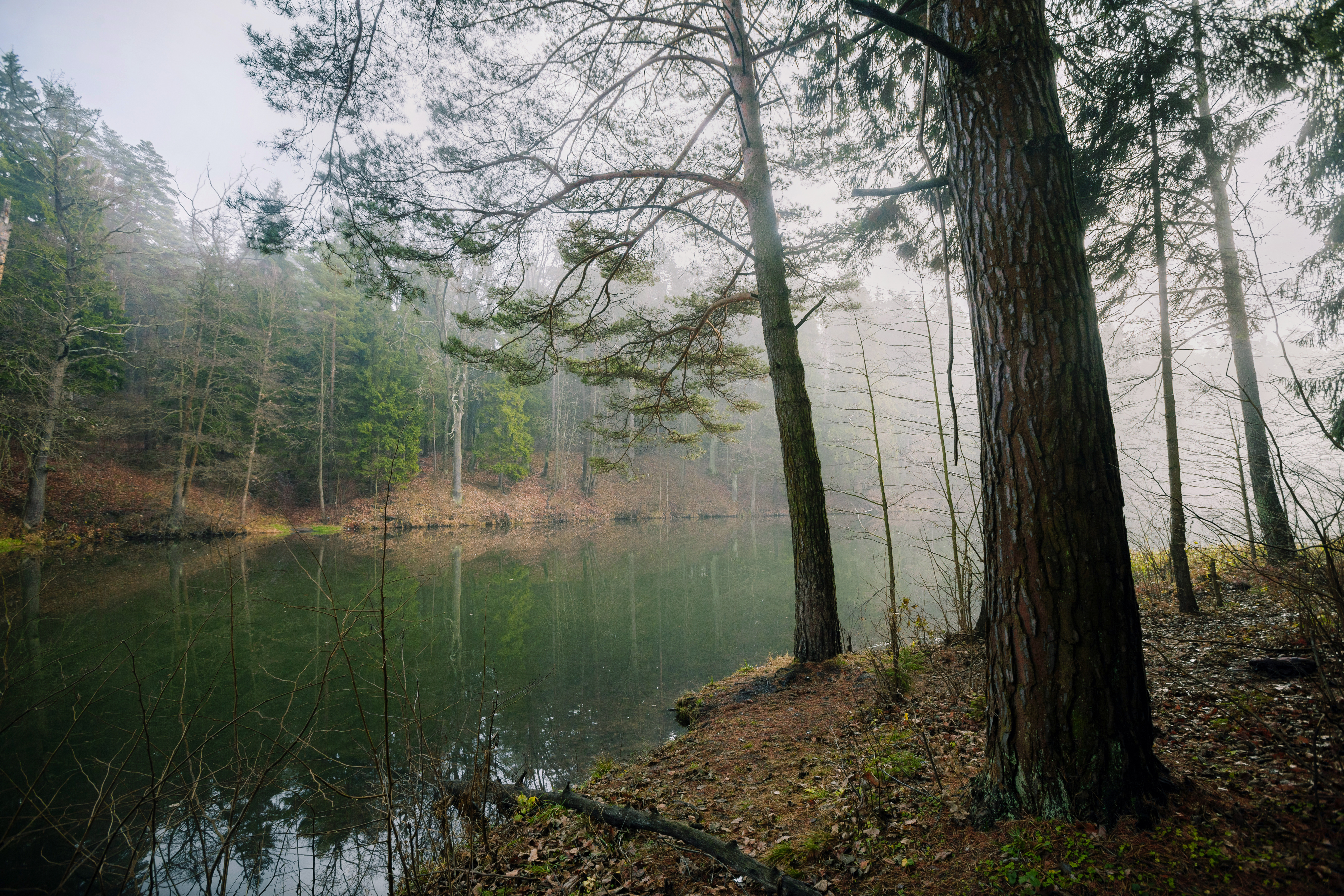 Беларуская (тарашкевіца): Заказьнік мясцовага значэньня «Пячэрскі лесапарк»